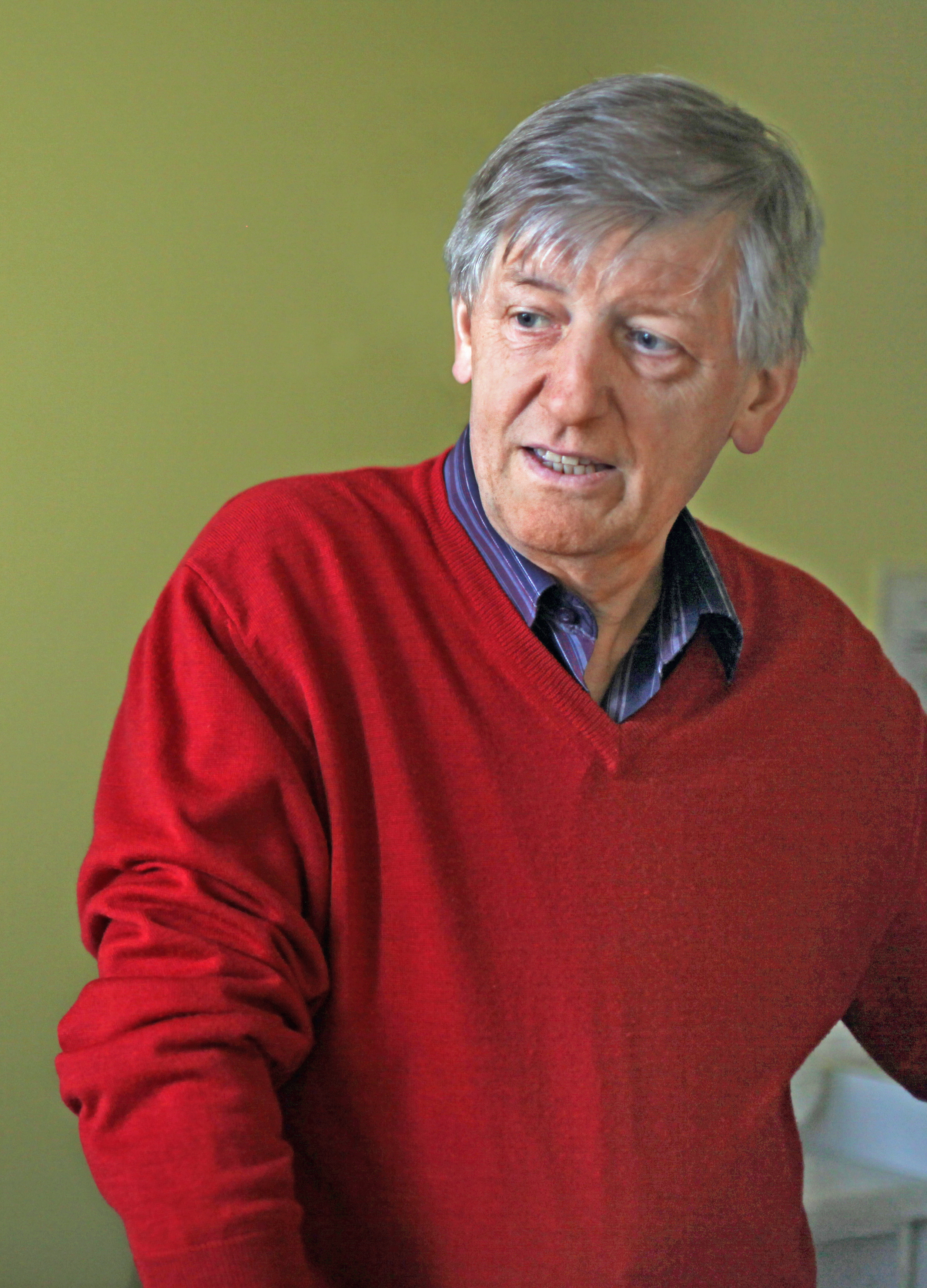 Porträt von Václav Riedlbauch (Mitte 2013).